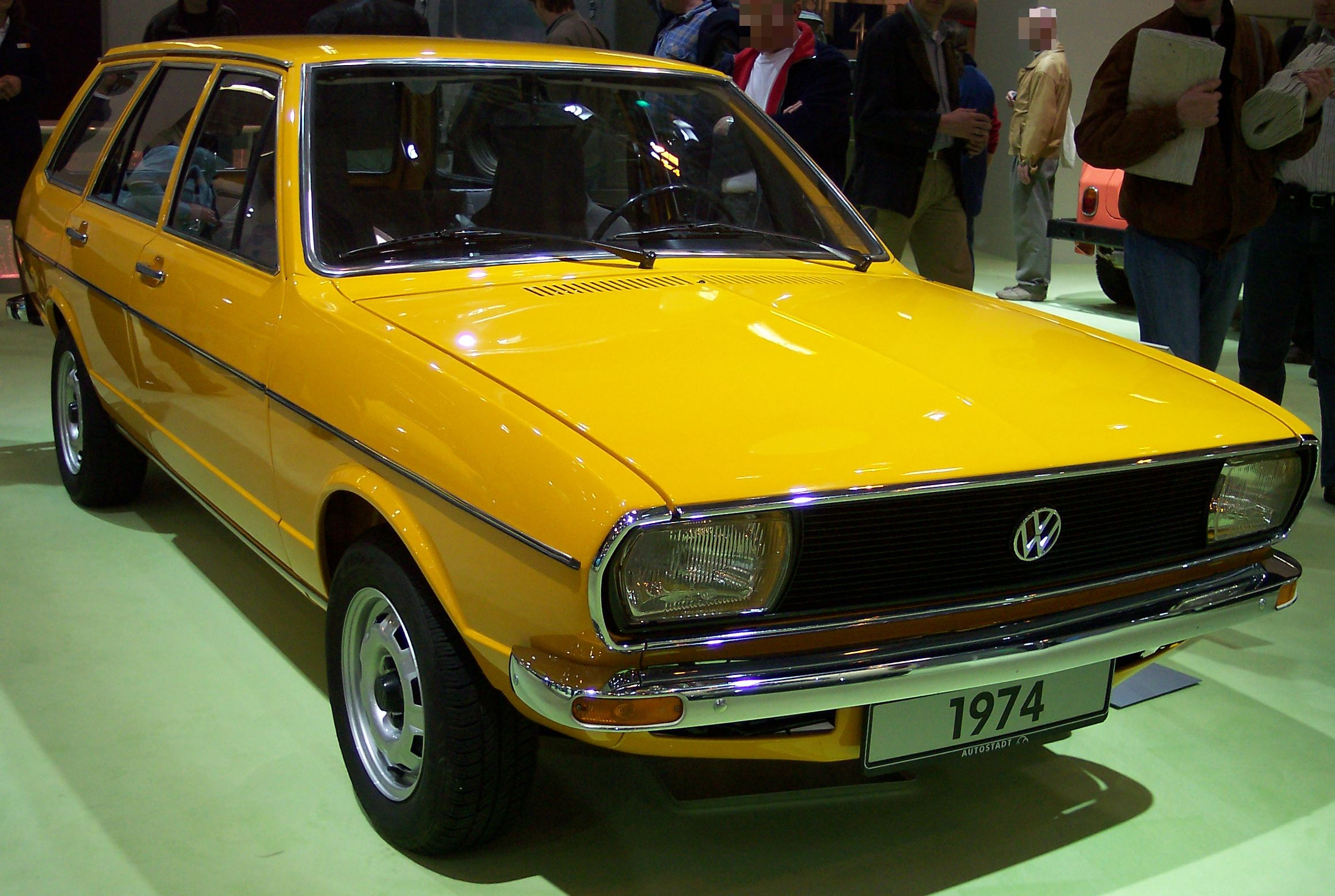 VW Passat I Kombi.